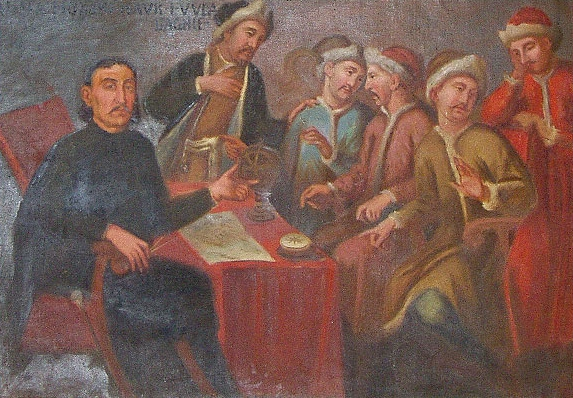 Marko Martinović uči pitomce Petra Velikog, ulje na platnu, fragment.